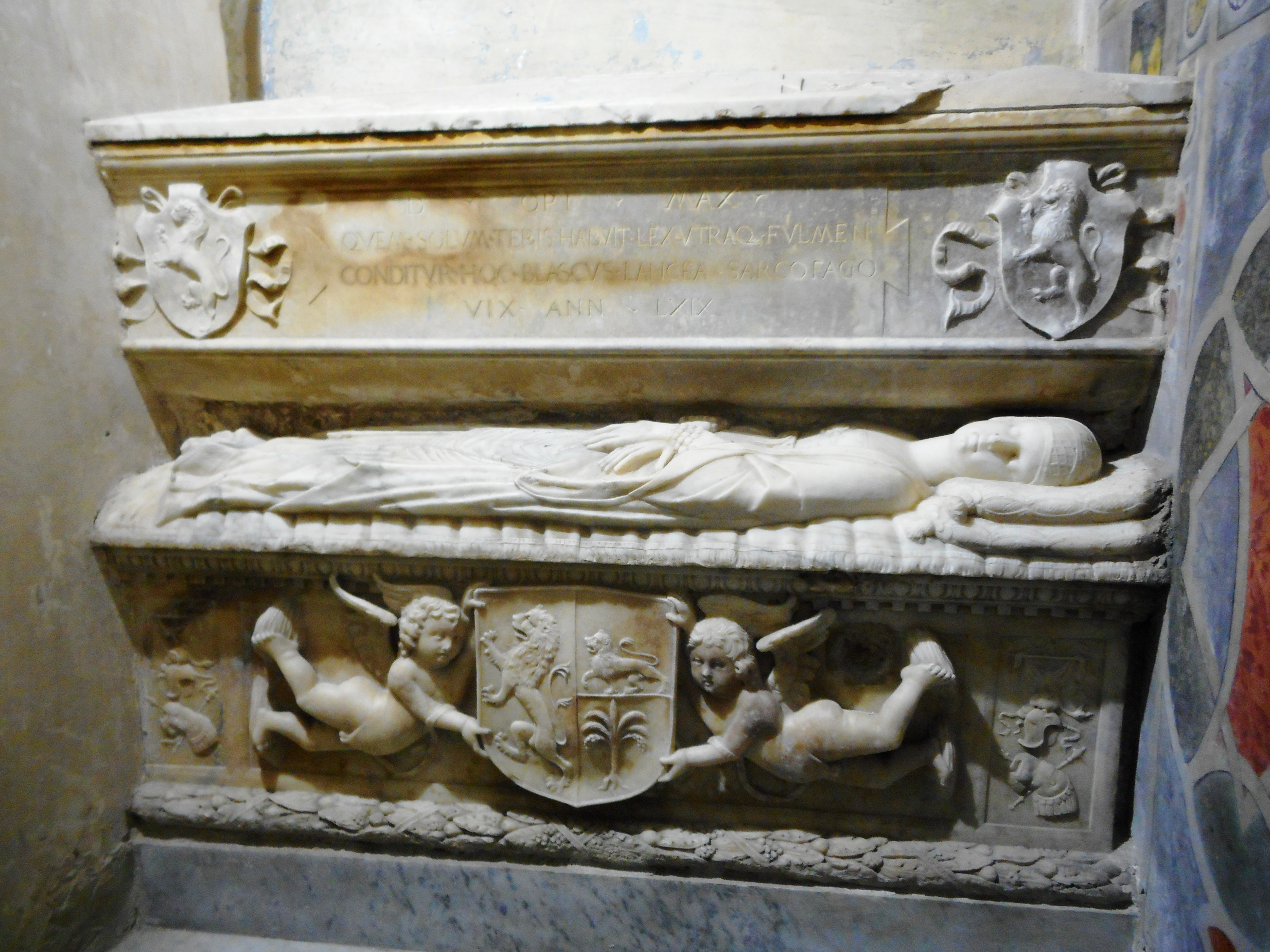 Sepolcro di Blasco Lanza, nella cripta Lanza nella chiesa di Santa Cita a Palermo, con il presunto sarcofago di Laura Lanza baronessa di Carini